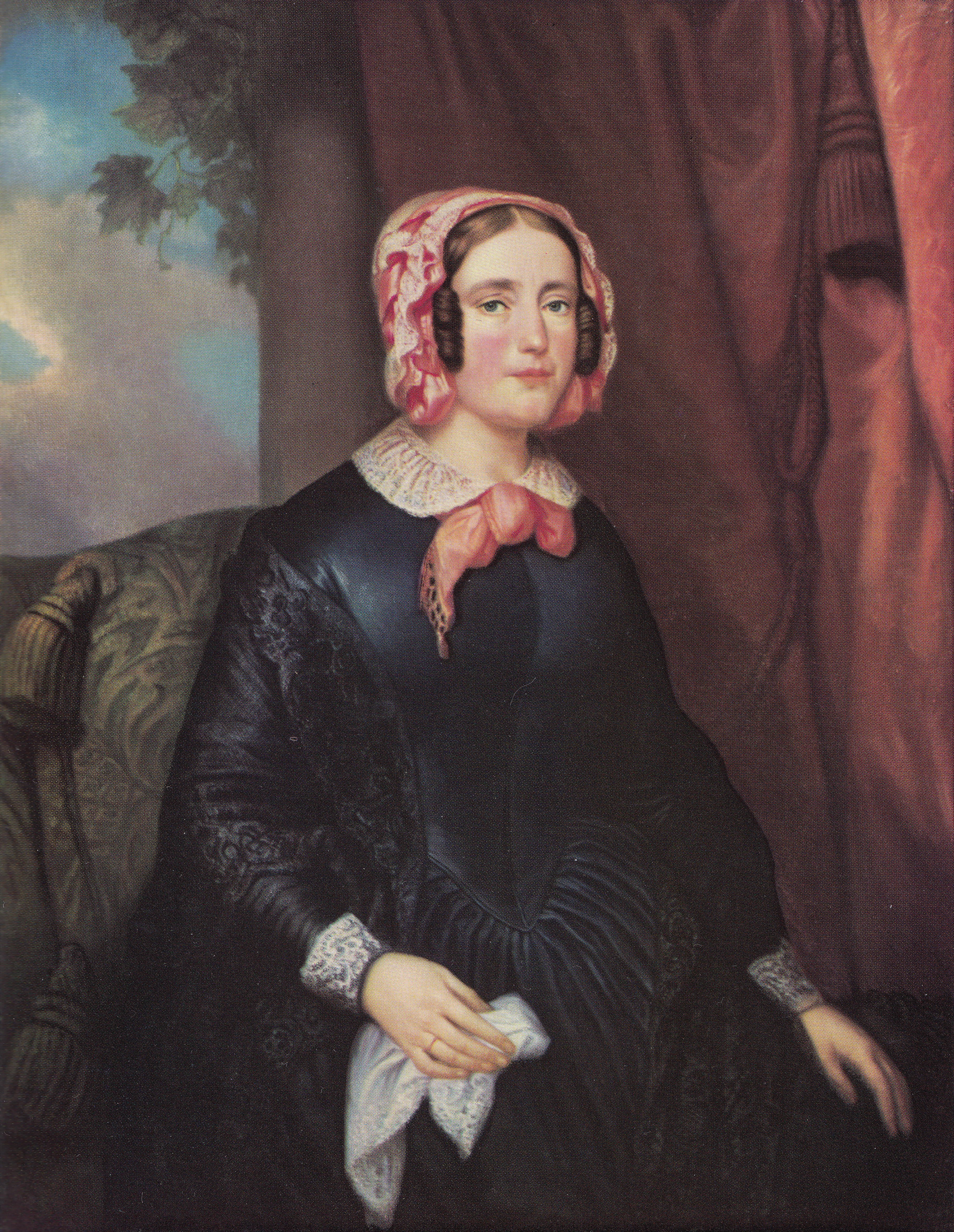 Geschilderd portret van Aldegonda Hoeberechts (1798-1878), echtgenote van de Maastrichtse ondernemer Petrus Regout.